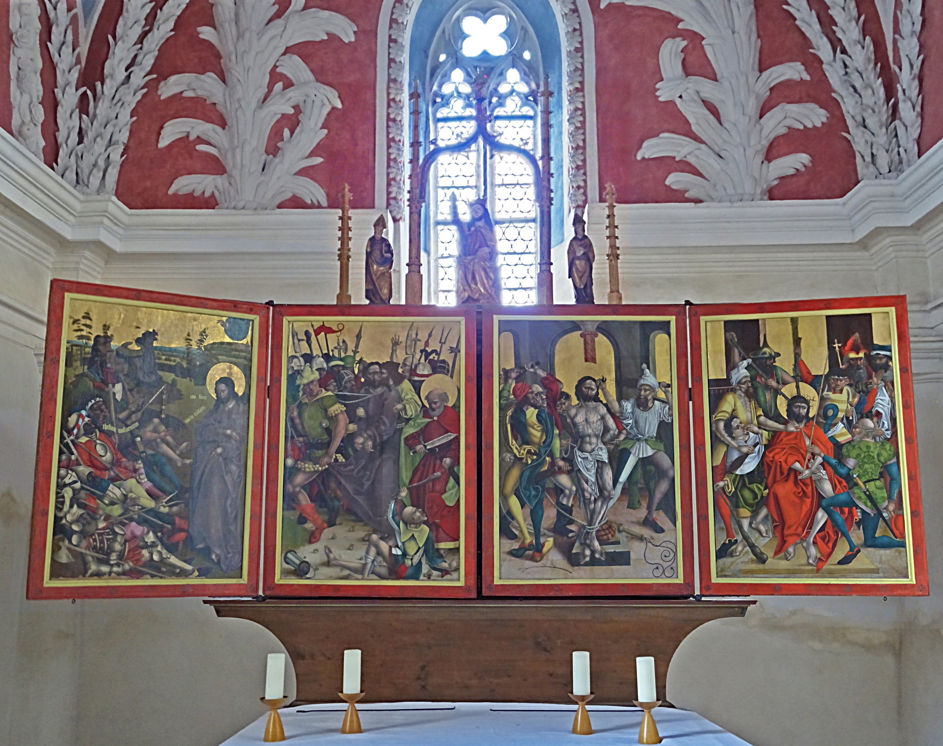 Wandelaltar vom Meister des Schwarzaer Altars (1487) in der Kirche St. Simon und Juda (Neunhofen), erste Wandlung - halb geöffnet